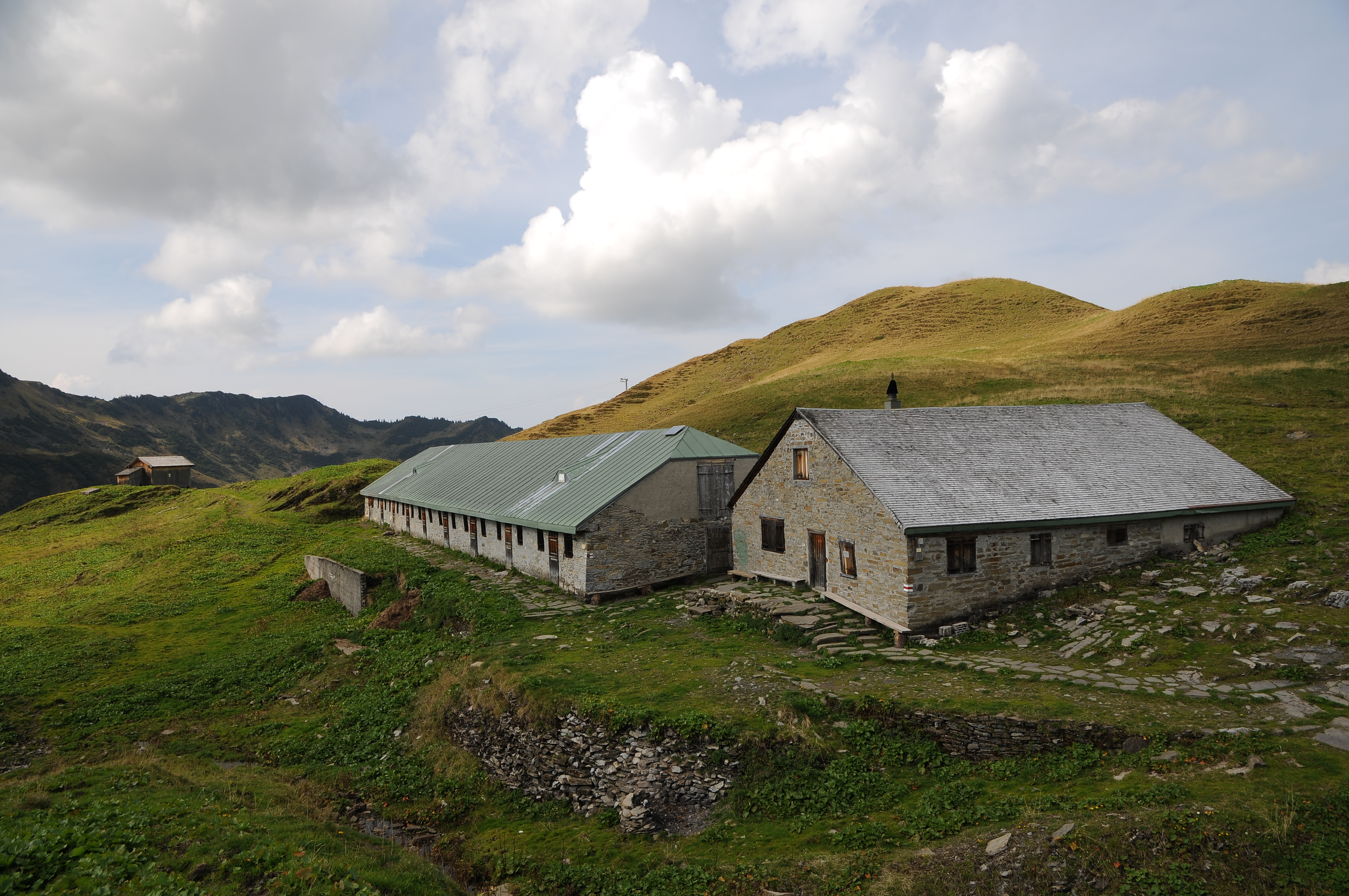 Die Sünser Alpe liegt im äußersten Osten von Dornbirn an der Grenze zu Damüls.